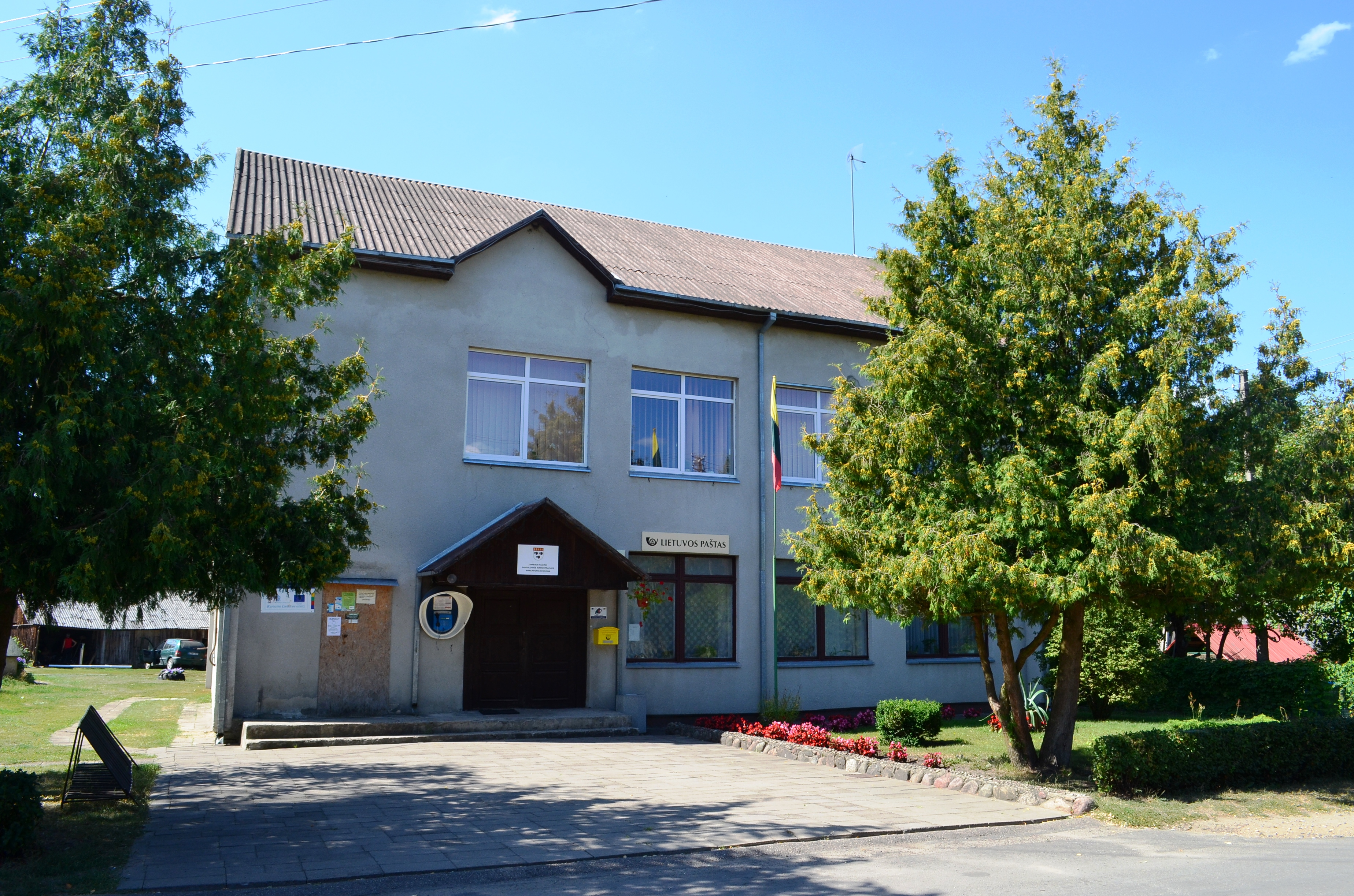 Marcinkonių seniūnija, Marcinkonys, Varėnos r.